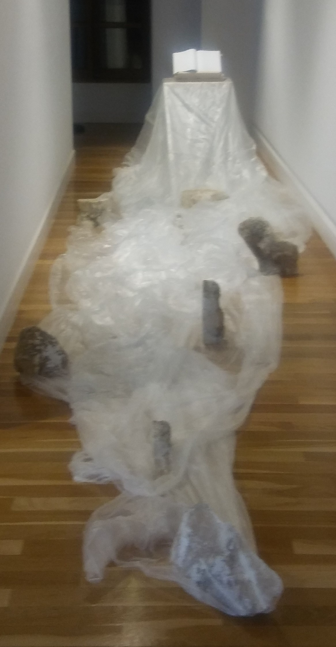 María Jesús Cueto. "Cristal de las horas". Instalación en memoria de la poeta Pilar Quirosa Cheyrouze fallecida en 2019. Museo de Arte e Historia. Durango